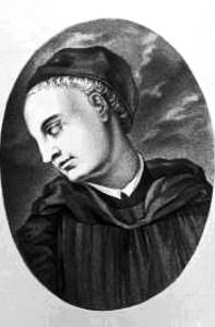 Bernhard Pez (1683-1735), Ausschnitt aus einem Kupferstich von Georg Wilhelm Sal[o]musmüller, dem Titelbild von Pez' Thesaurus anecdotorum novissimus; Quelle